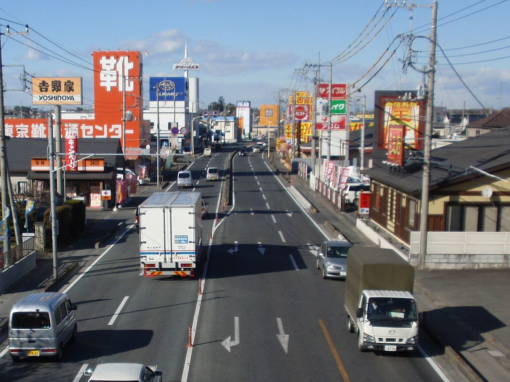 国道407号東松山バイパス（埼玉県東松山市新宿町）